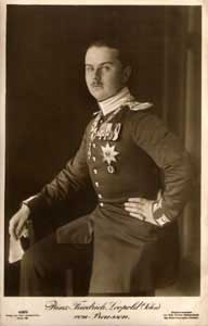 Prinz Friedrich Leopold von Preußen (Junior!, 1895-1959)